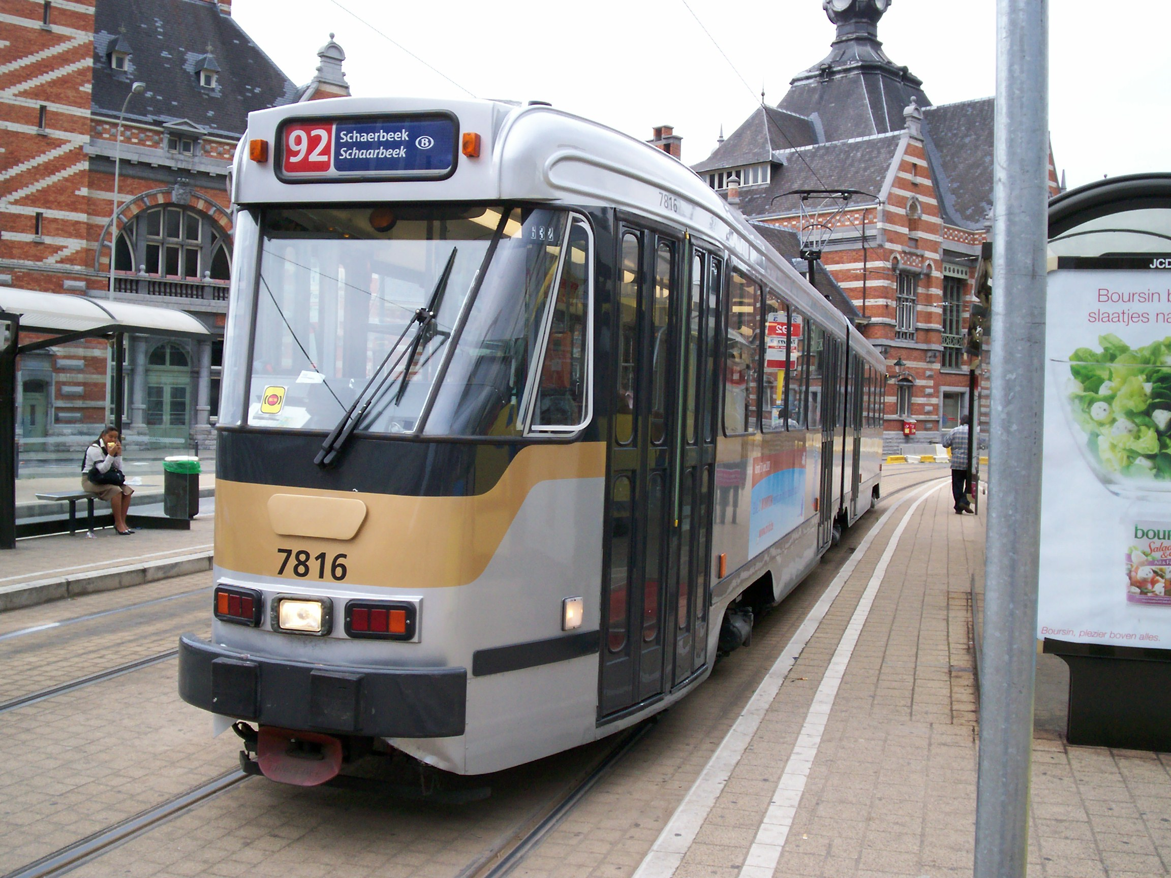 Vue avant du PCC 7800 rénové de face sur la ligne 92 à Schaerbeek Gare